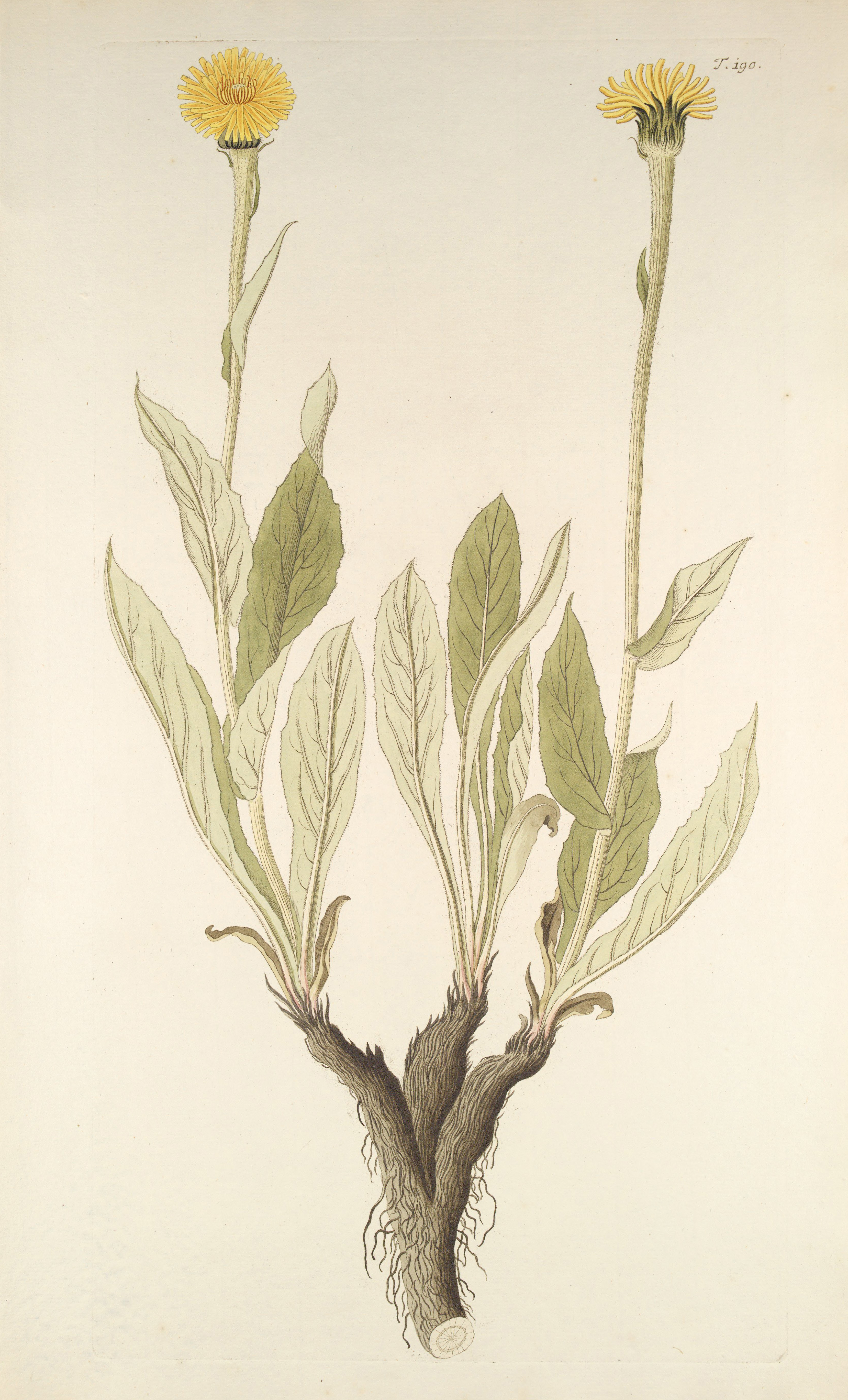 Legende: Ganze Pflanze.